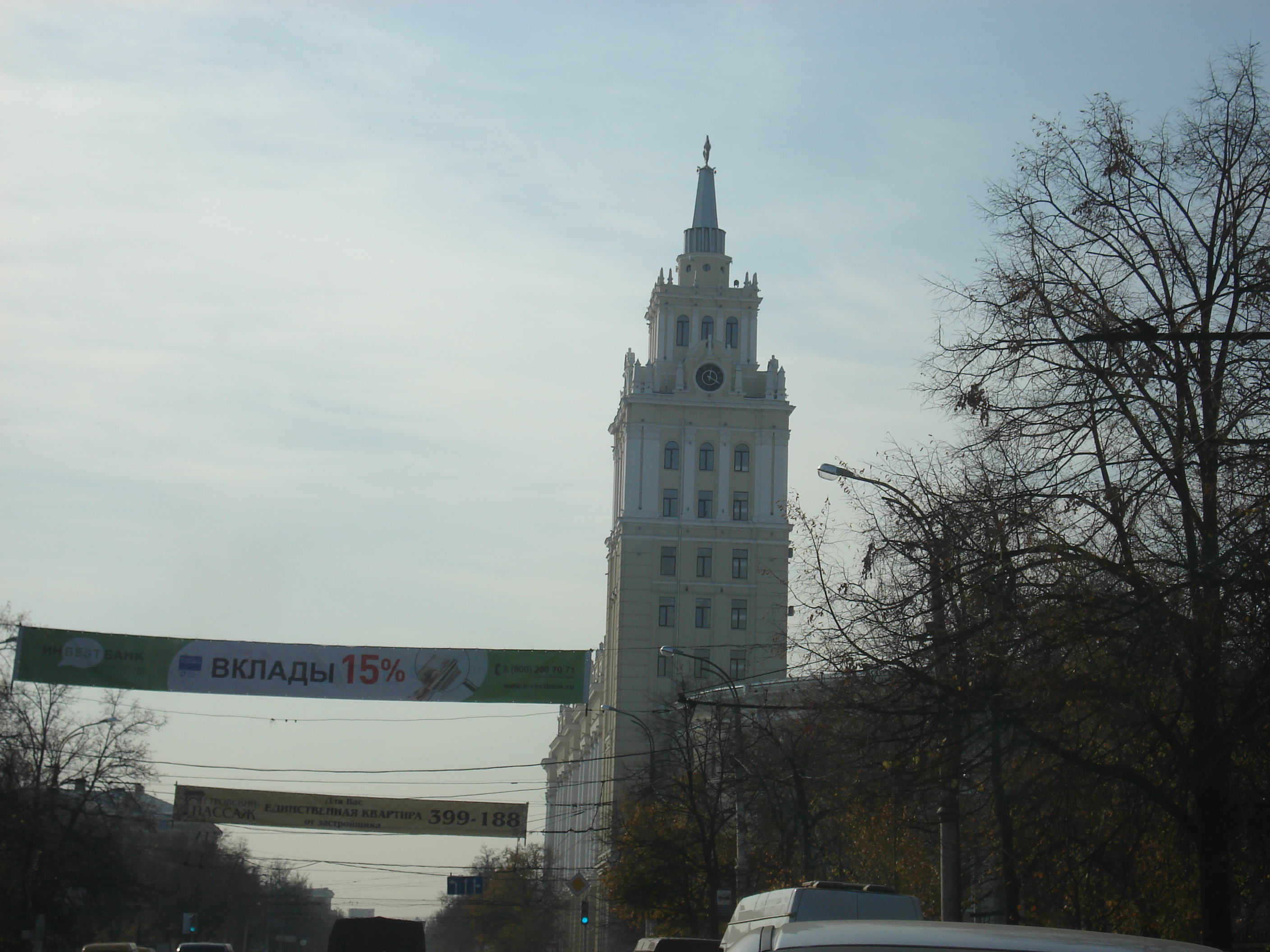 Здание управления ЮВЖД в Воронеже